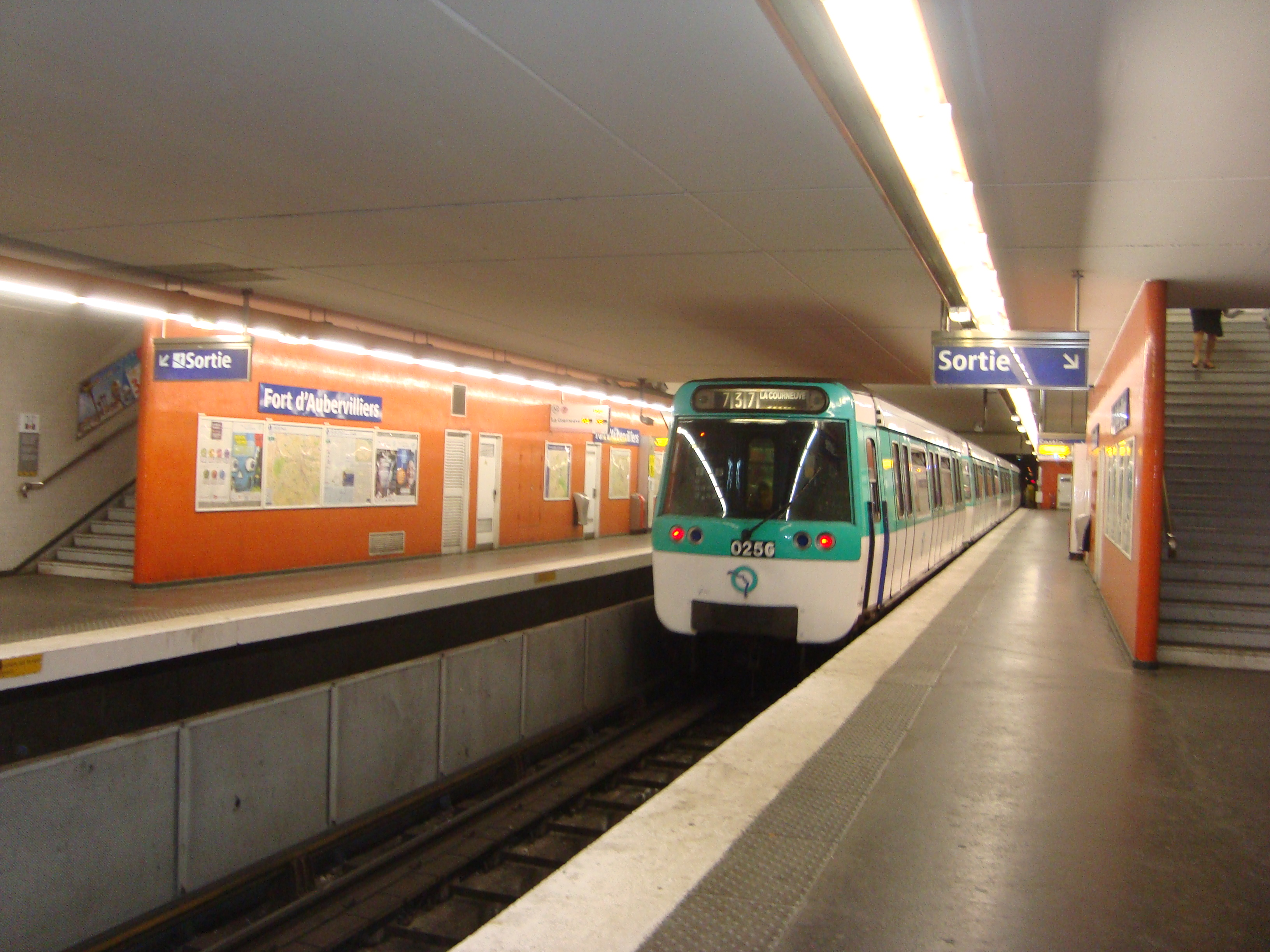 Vue des quais de la station de métro Fort d'Aubervilliers sur la ligne 7 au départ d'une rame venue d'Ivry-Villejuif. Photo prise du quai direction Ivry-Villejuif.